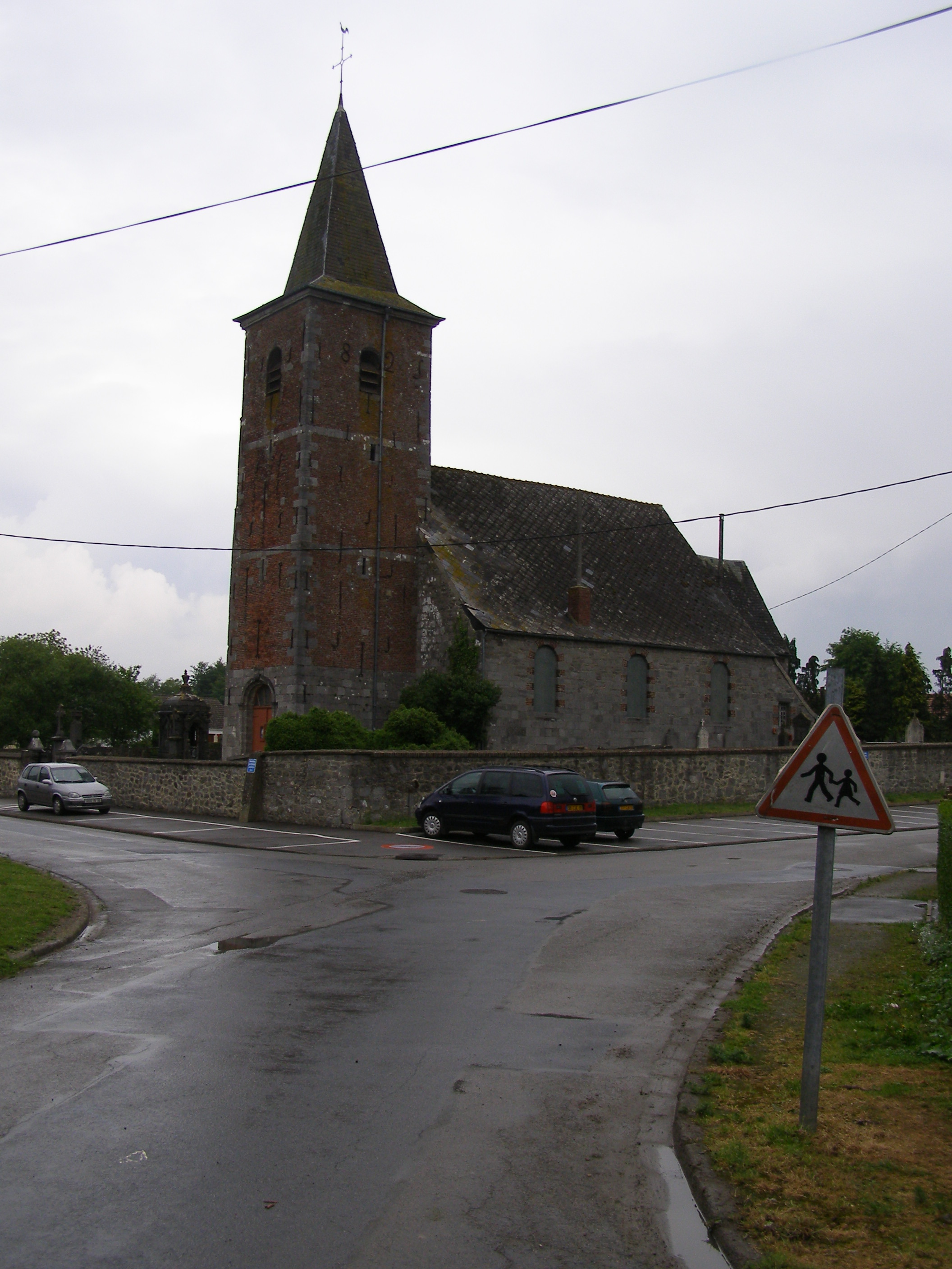 L'église